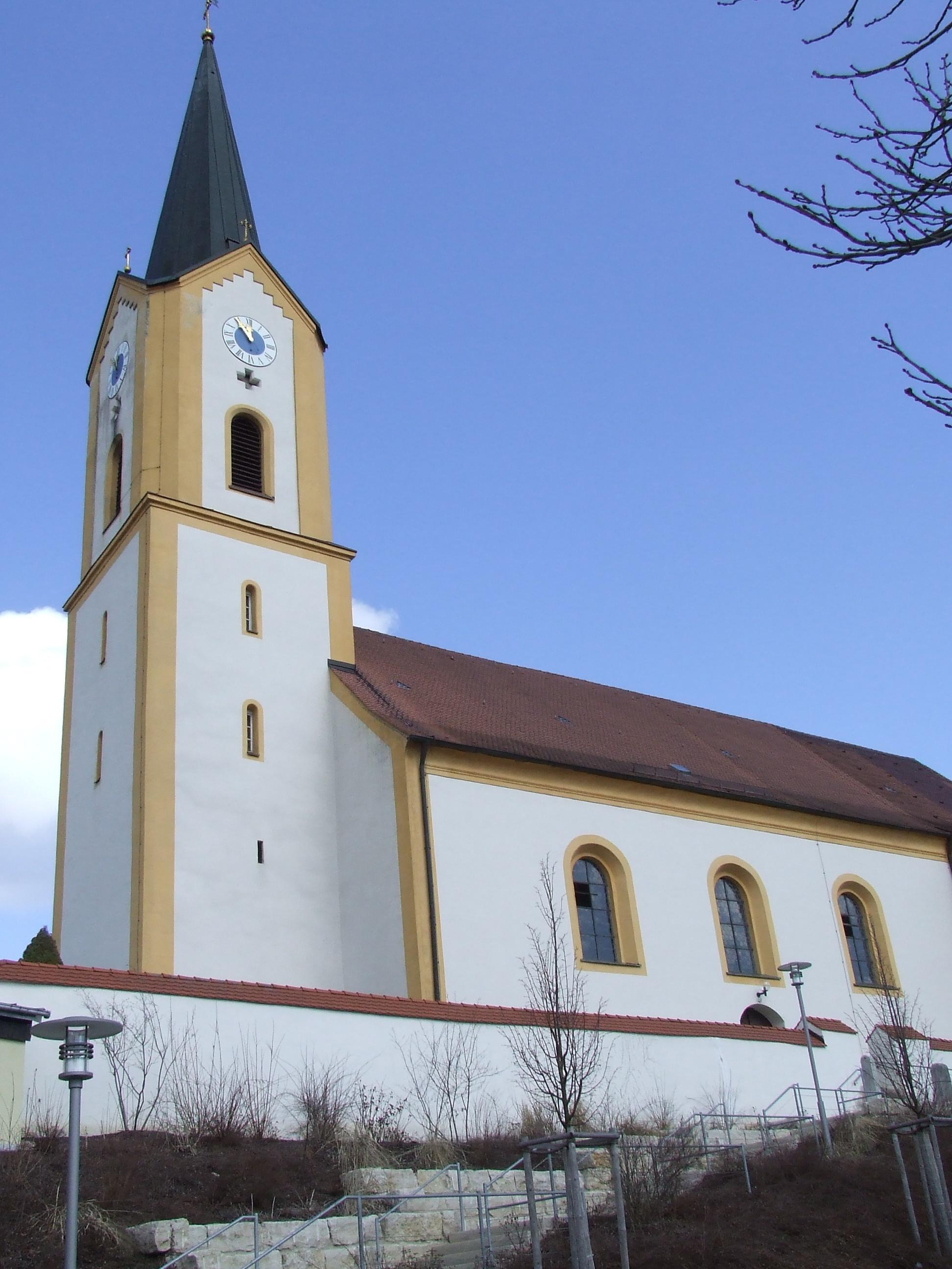 Landkreis Neumarkt Kirche, die katholische Pfarrkirche St. Willibald Deining von Süden.JPG